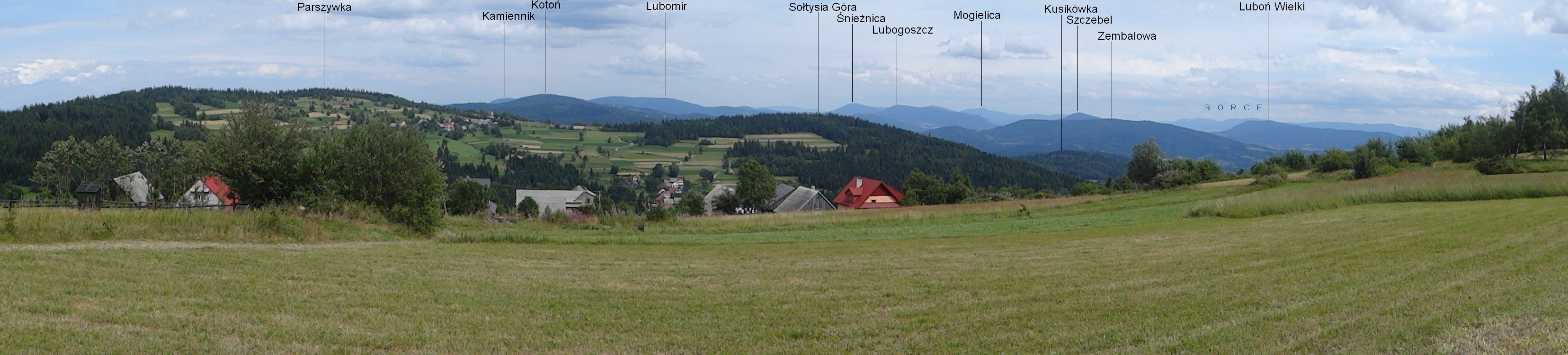 Panorama widokowa z Koskowej Gory